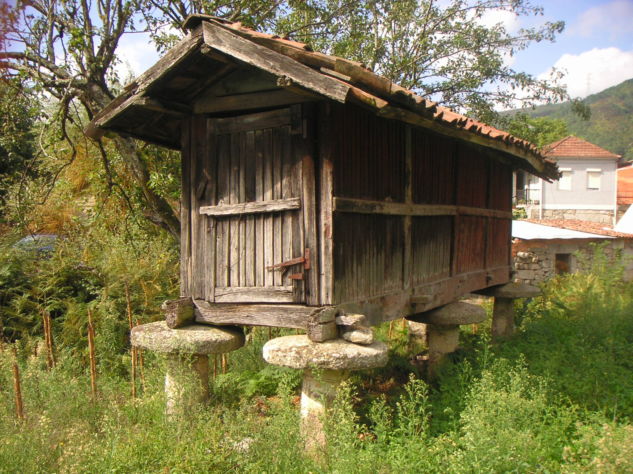 Horreo de madeira, en Allariz